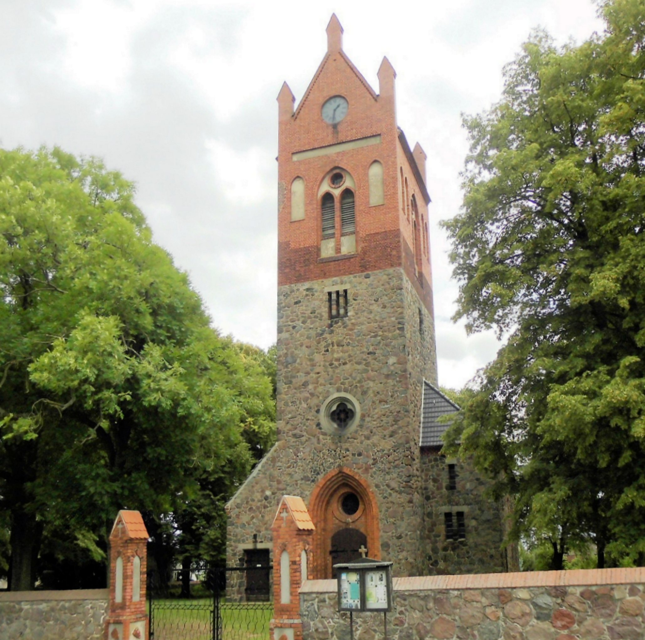 Dorfkirche und Feldsteinmauer des Kirchhofs in Hasenfelde, Gemeinde Steinhöfel, Landkreis Oder-Spree, Deutschland